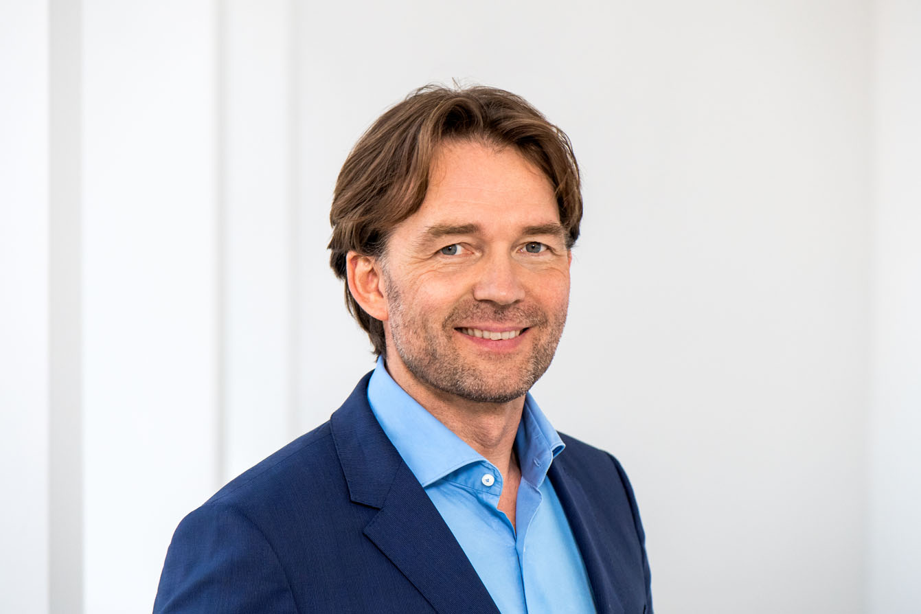 Prof. Dr. Dr. h.c. Matthias H. Tschoep; Lehrstuhl fuer Stoffwechselerkrankungen, Fakultaet für Medizin der Technischen Universitaet Muenchen (TUM); Foto: © Astrid Eckert / TU Muenchen; Verwendung frei fuer die Berichterstattung ueber die TU Muenchen unter Nennung des Copyrights